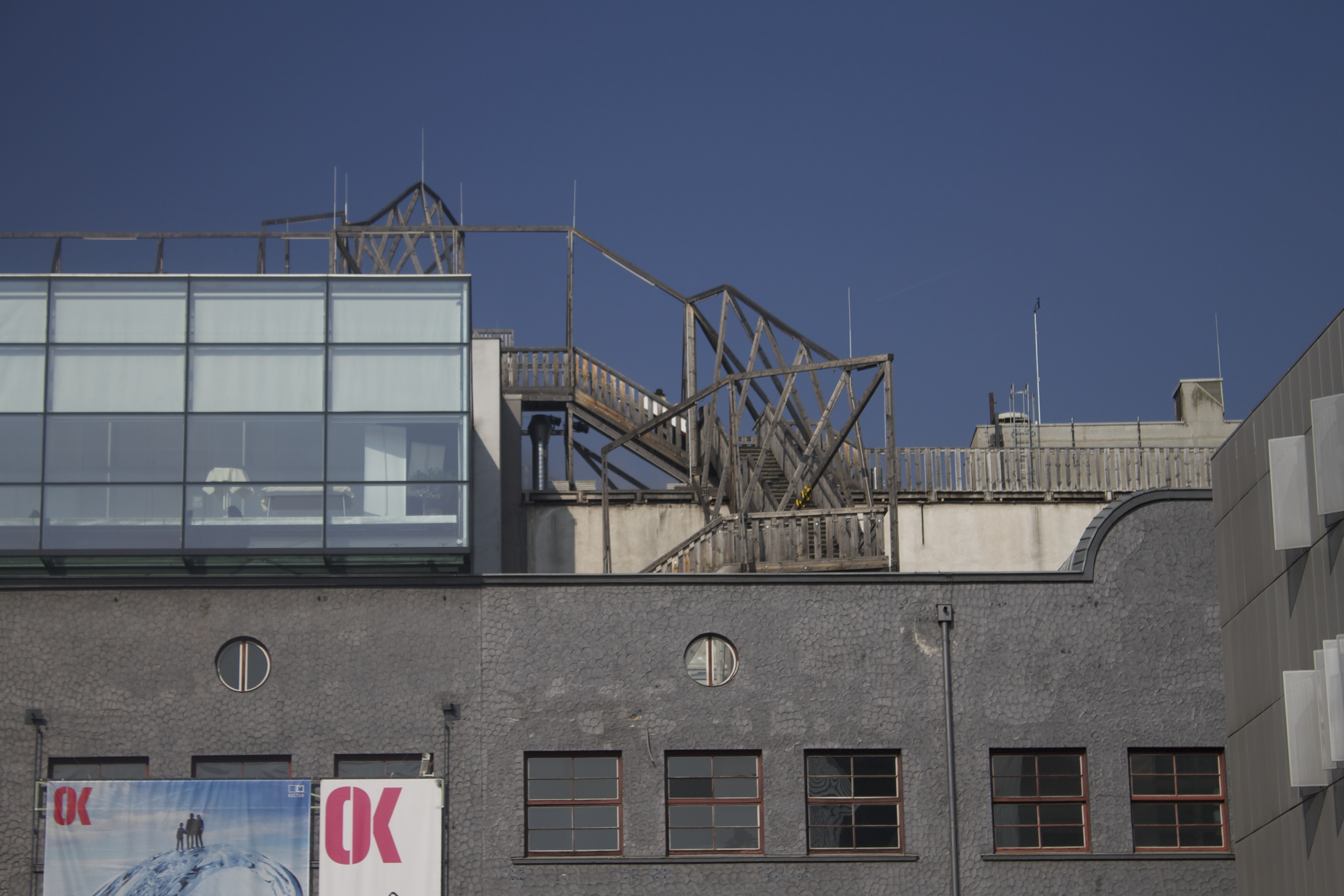 Höhen Rausch Parkour 2011 am Offenen Kulturhaus Linz